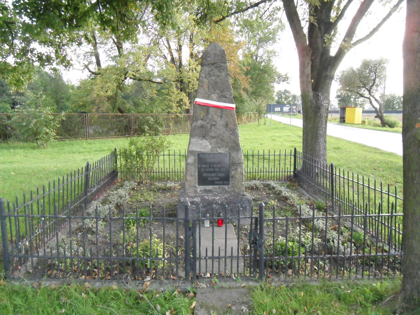 Pomnik ku czci poległych w I wojnie światowej i wojnie polsko-rosyjskiej w Czubinie